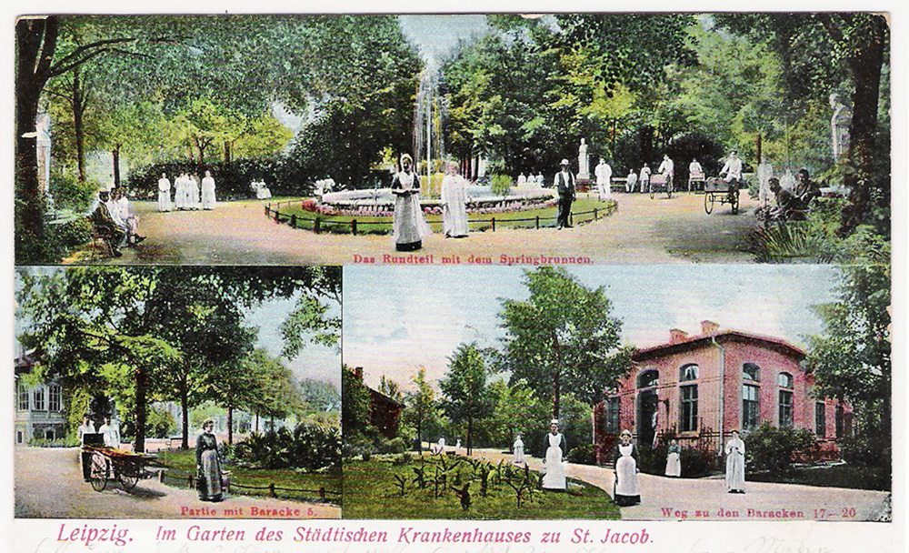 Im Garten des Krankenhauses St. Jakob in Leipzig.